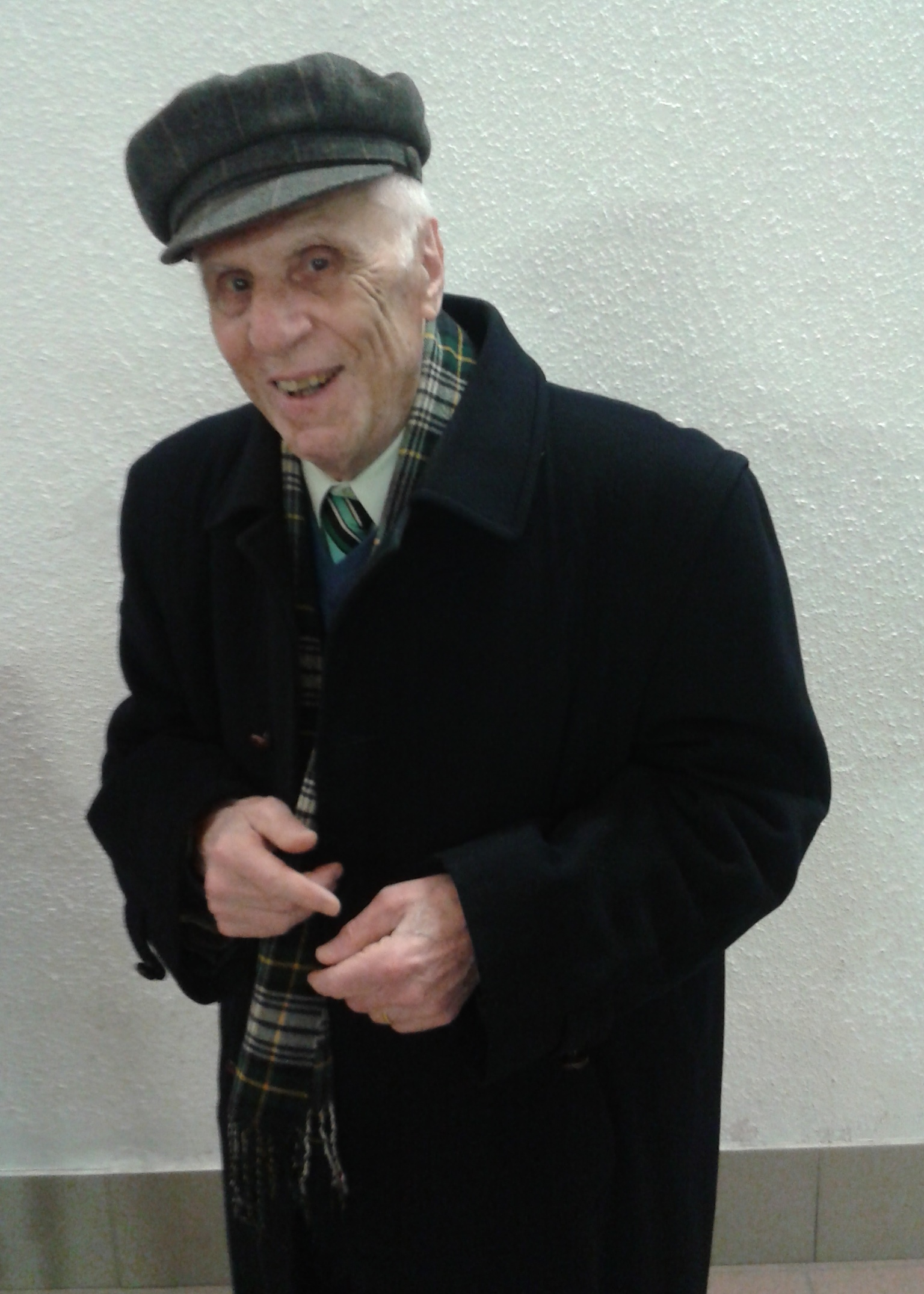 Enrico Scaravelli nel 2015